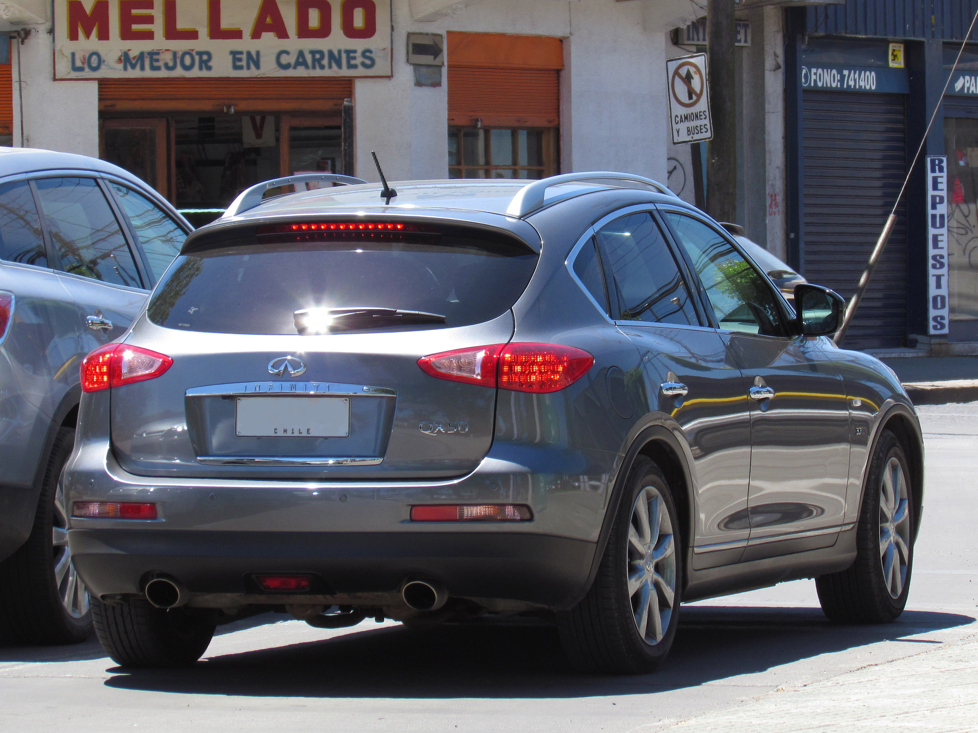 Infiniti QX 50 3.7 2015